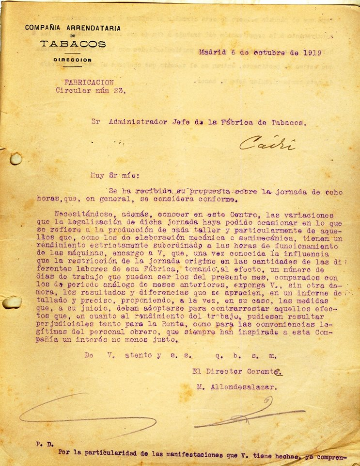 Carta Compañia Arrendataria de Tabacos al Director de la Fábrica de Tabacos, 6 de Octubre de 1919.